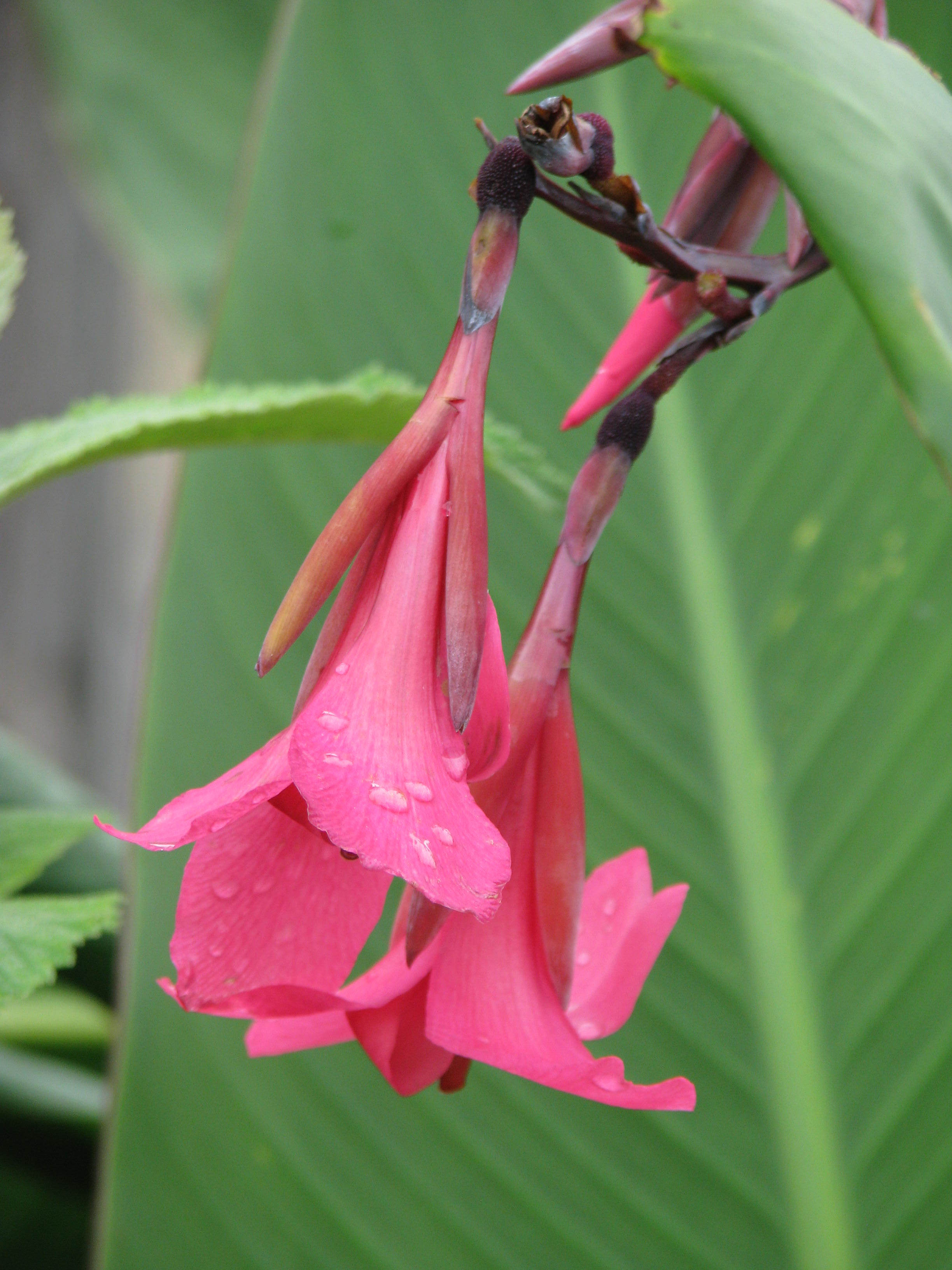 Canna x ehemannii